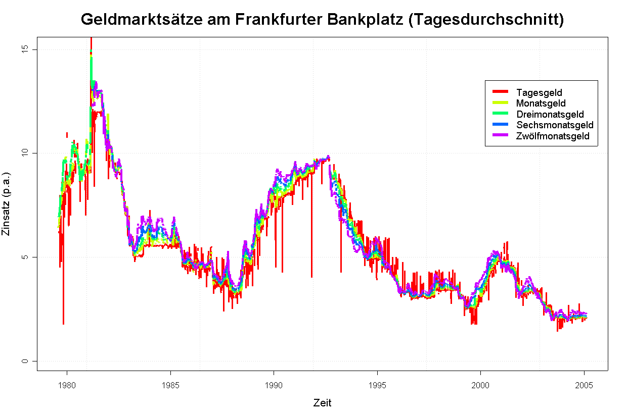 Geldmarktzinssätze (Tagesgeld, 1-, 3-, 6- und 12-Monatesgeld)